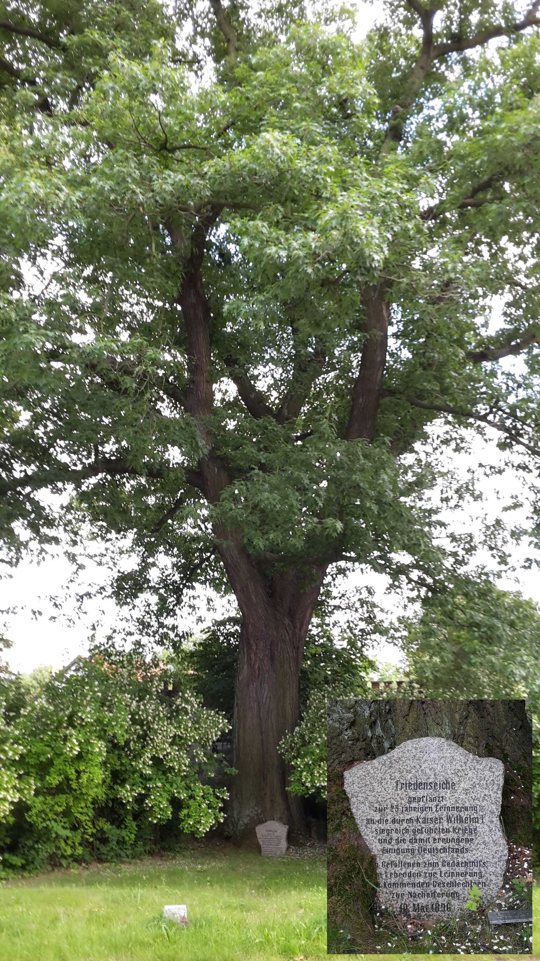 Friedenseiche mit Gedenkstein in Görlitz (10. Mai 1896)